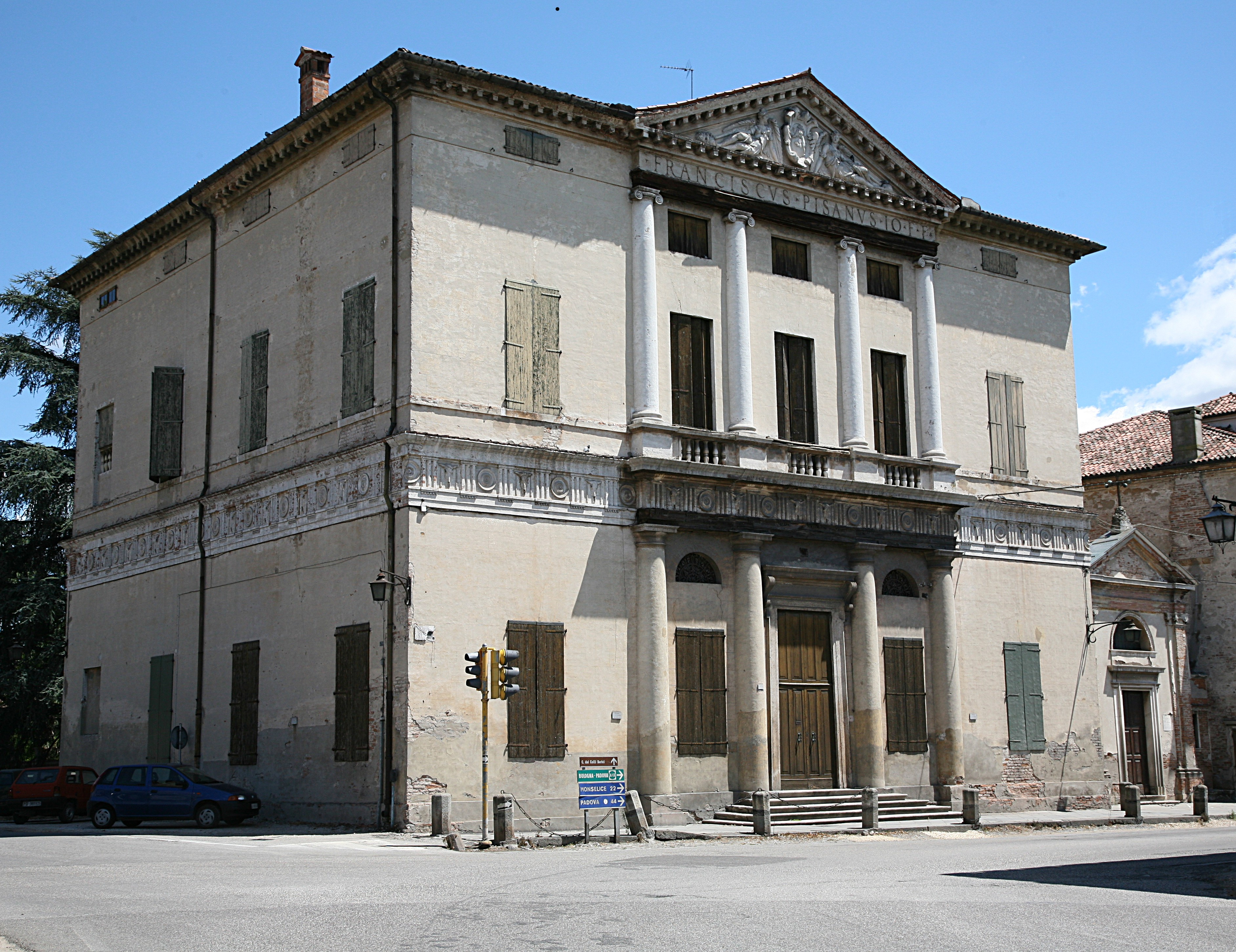 Montagnana